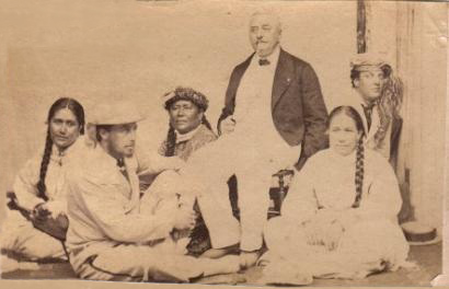 Portrait du Prince Alfred, Duc d'Edimbourg de Saxe-Cobourg et Gotha, Monsieur John Brander et son épouse Titana (ou Titaua), Madame Moetia Salmon, 1870. Tirage albuminé monté sur carton. 6,5 x 10 cm Le Prince Alfred (1844-1900), fils de la Reine Victoria, arriva le 20 juin 1870 à Tahiti à bord de la Frégate H.M.S. Galatea. Cette visite donna lieu à de nombreuses cérémonies. Après une visite officielle à la Reine Pomaré IVet au Gouvernement français, le jeune Prince se rendit à l'Observatoire du Capitaine Cook, à la Cascade de Fatna et aux fêtes données par Monsieur John Brander (1814-1877), négociant écossais installé à Tahiti en 1851. Les soeurs Titana Brander et Moetia Salmon étaient les nièces de la Reine Pomare IV. Elles ont également été photographiées par Paul Emile Miot à la même époque. Au moment de son départ, le Prince Alfred déclara "Après Londres et Paris, Tahiti est le lieu que je quitte avec le plus de regrets.".